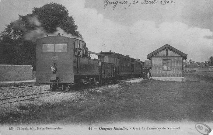 Gare de Guignes-Ville avant 1910.